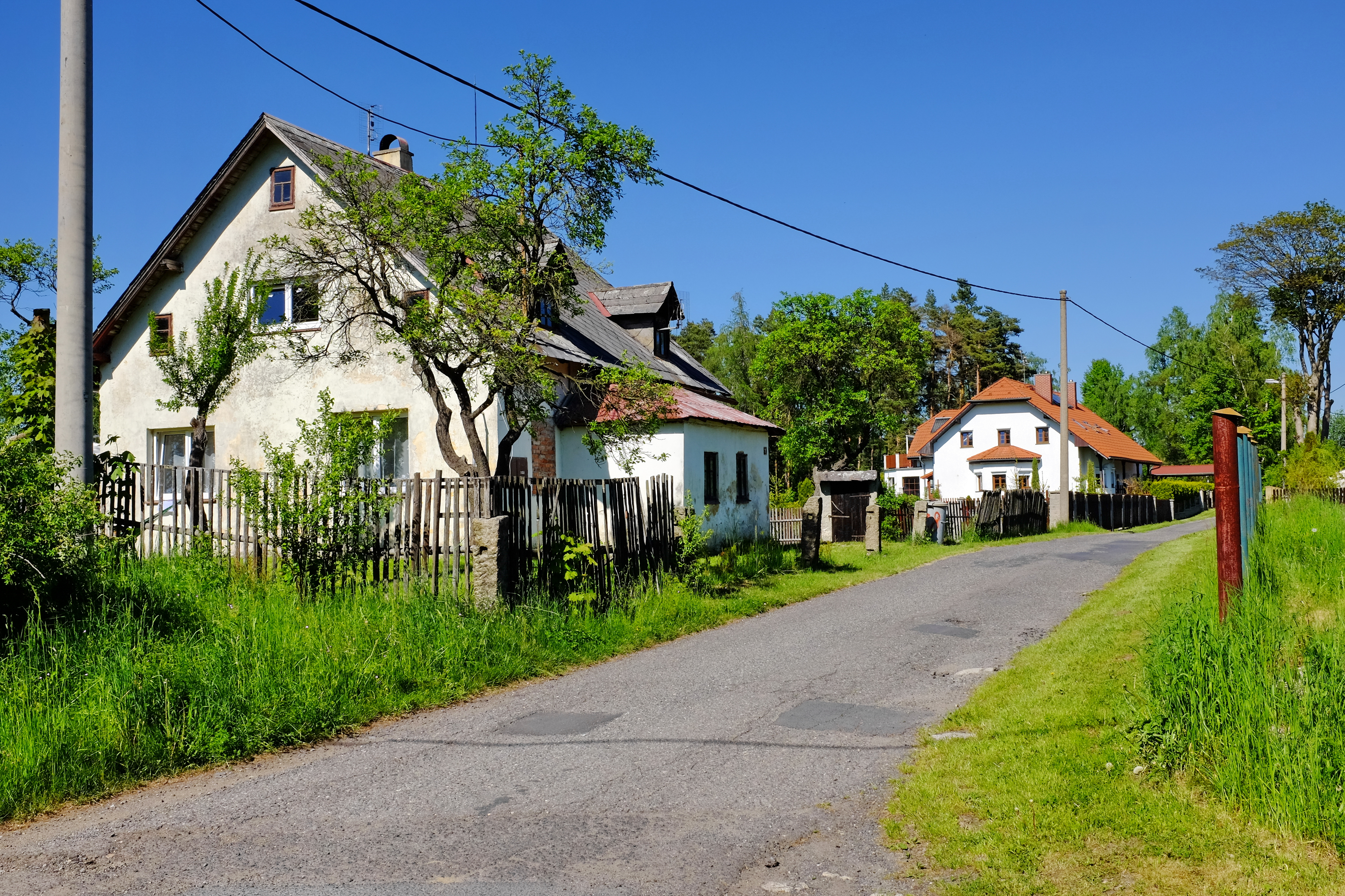 Rájec, část obce Černavy v okrese Karlovy Vary